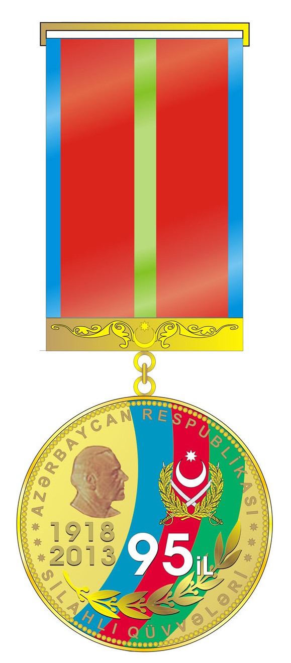 Azərbaycan Respublikasının «Azərbaycan Respublikası Silahlı Qüvvələrinin 95 illiyi (1918—2013)» yubiley medalı